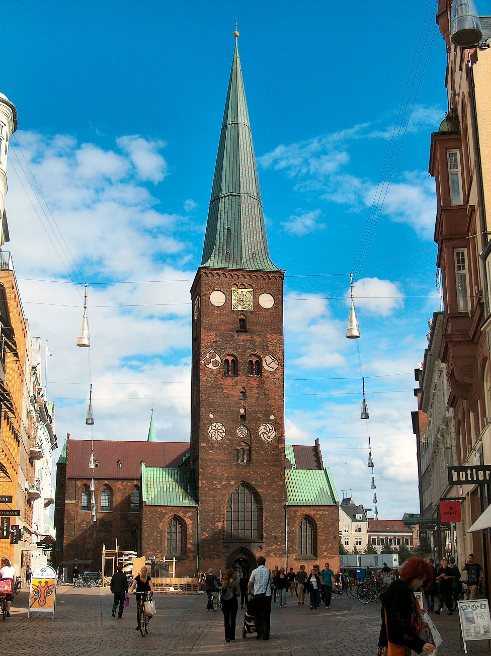 Århus domkirke